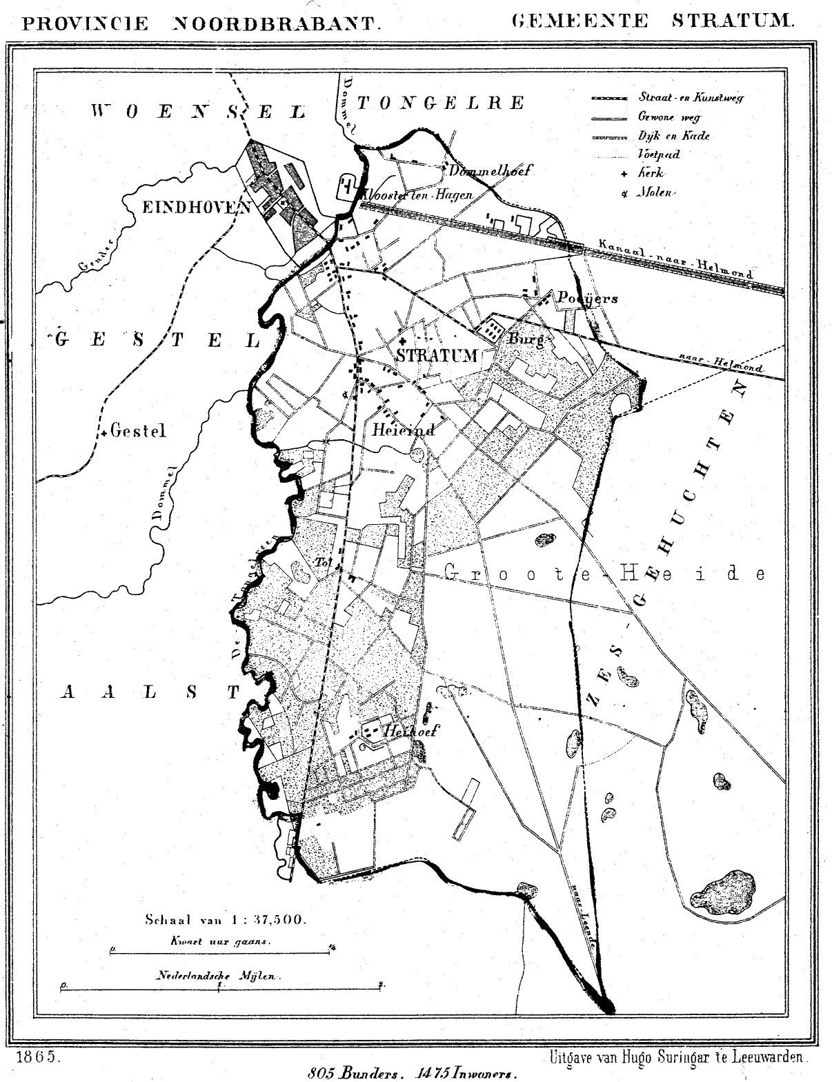 Nederland, Noord-Brabant, Gemeente Stratum